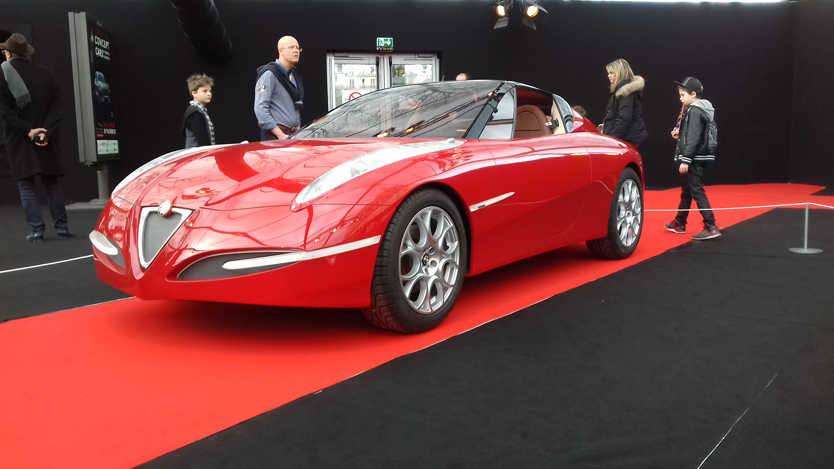 Alfa Romeo Vola au Festival automobile international 2017